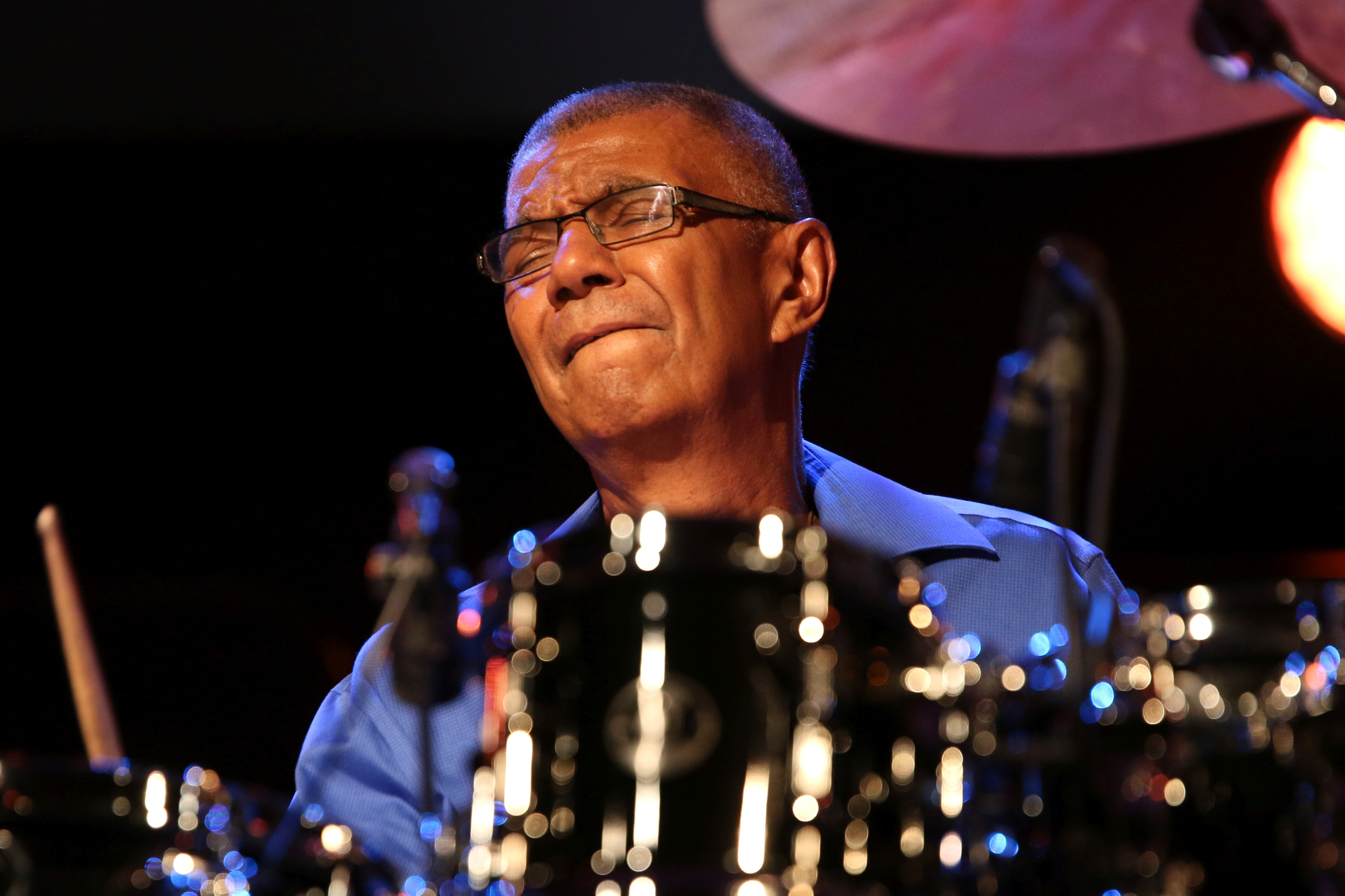 46. Deutsches Jazzfestival Frankfurt 2015: Jack DeJohnette